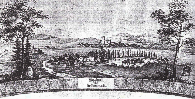 Gröbenstädt nach dem großen Band von 1848, im Vordergrund der Hammer Gröbenstädt